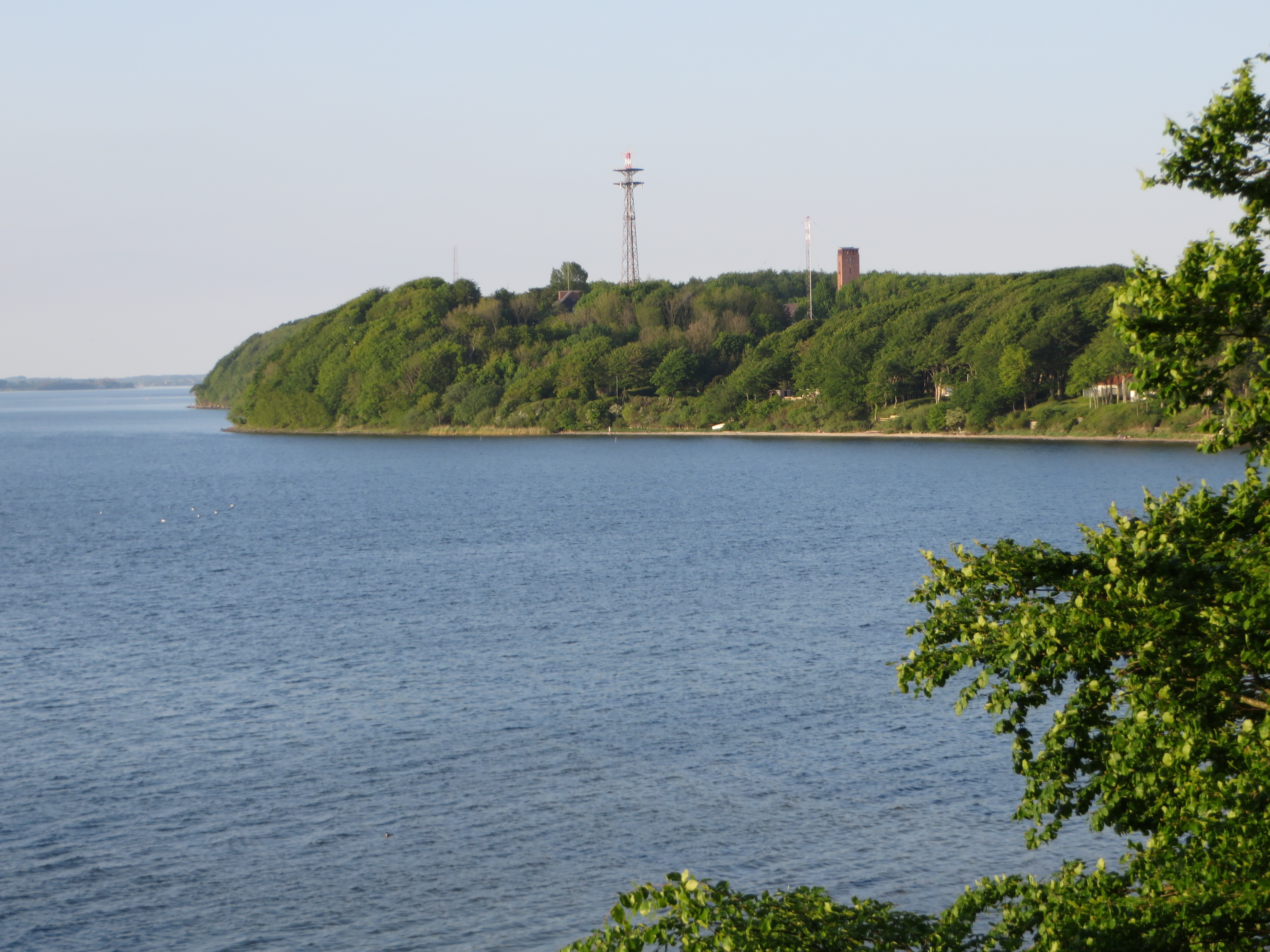 Blick nach Meierwik, Winziger-Hunk (2014)